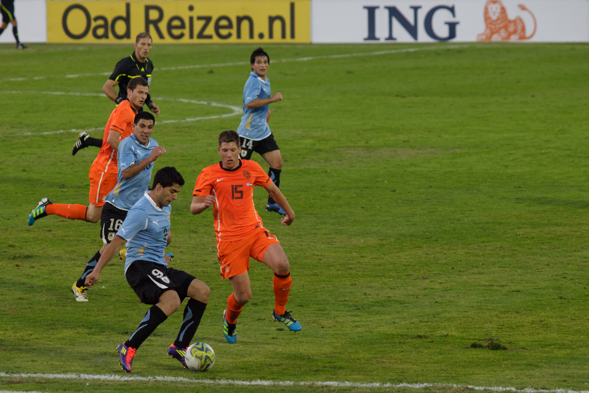 Stijn Schaars & Luis Suarez